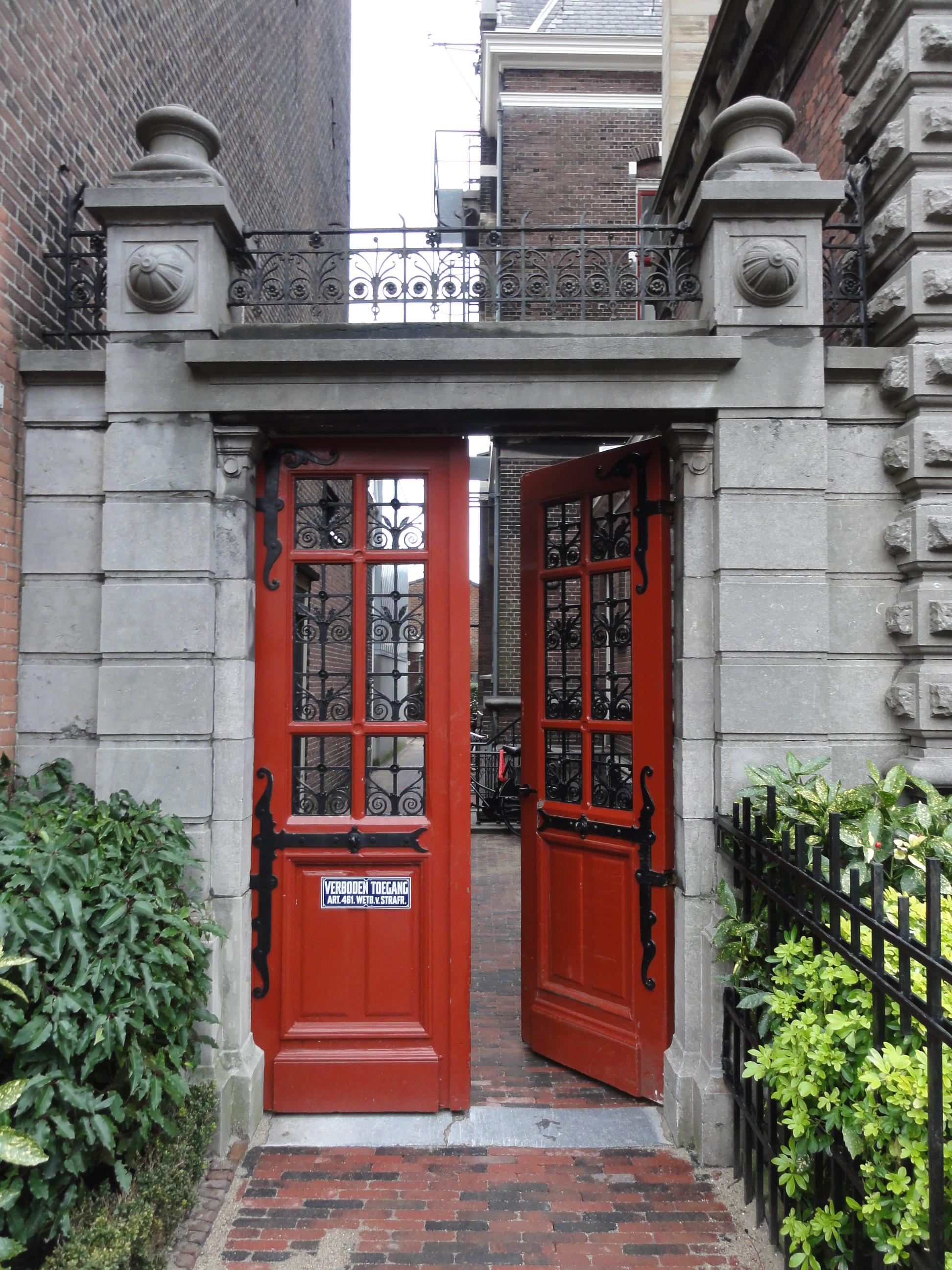 Poort naast de Kroonvilla aan de Stationsweg 25 te Leiden naar de achterliggende Paviljoenshof